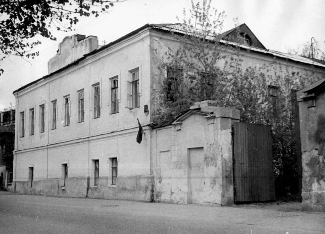 Дом, в котором жил краевед-историк, этнограф и общественный деятель г. Иваново-Вознесенска Яков Петрович Гарелин